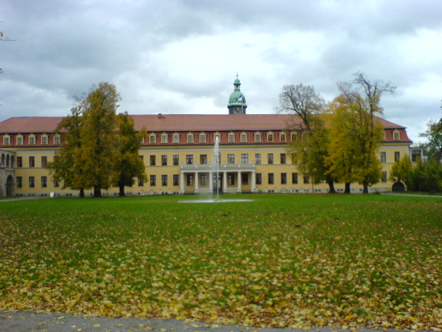 Schloss Sondershausen, Gartenseite